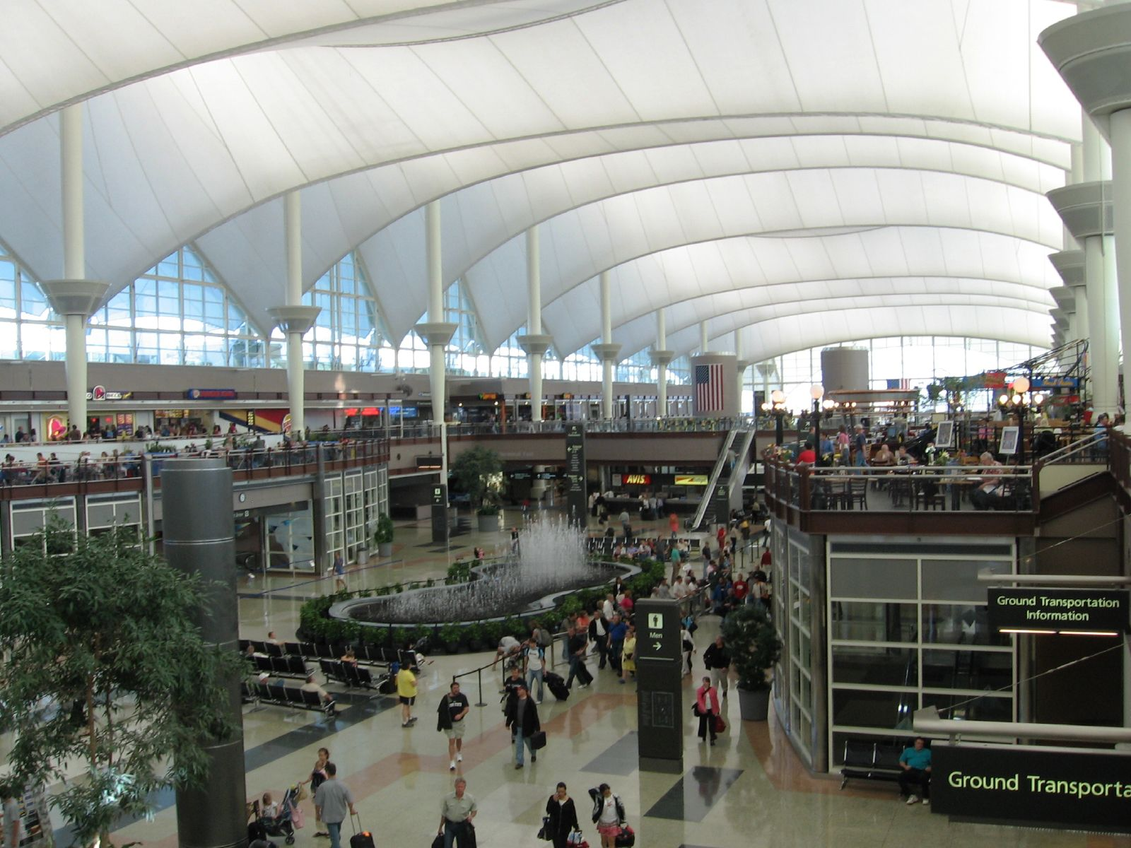 Denver Colorado Airport